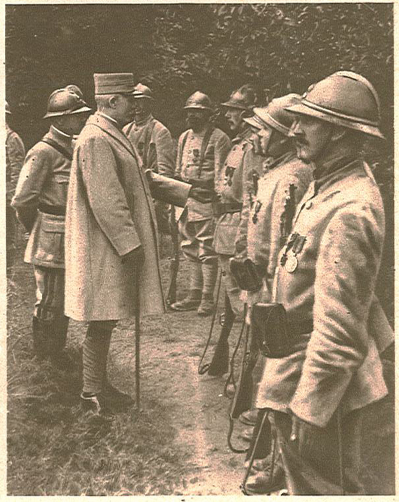 Le Miroir, n°203. Dimanche 14 octobre 1917.